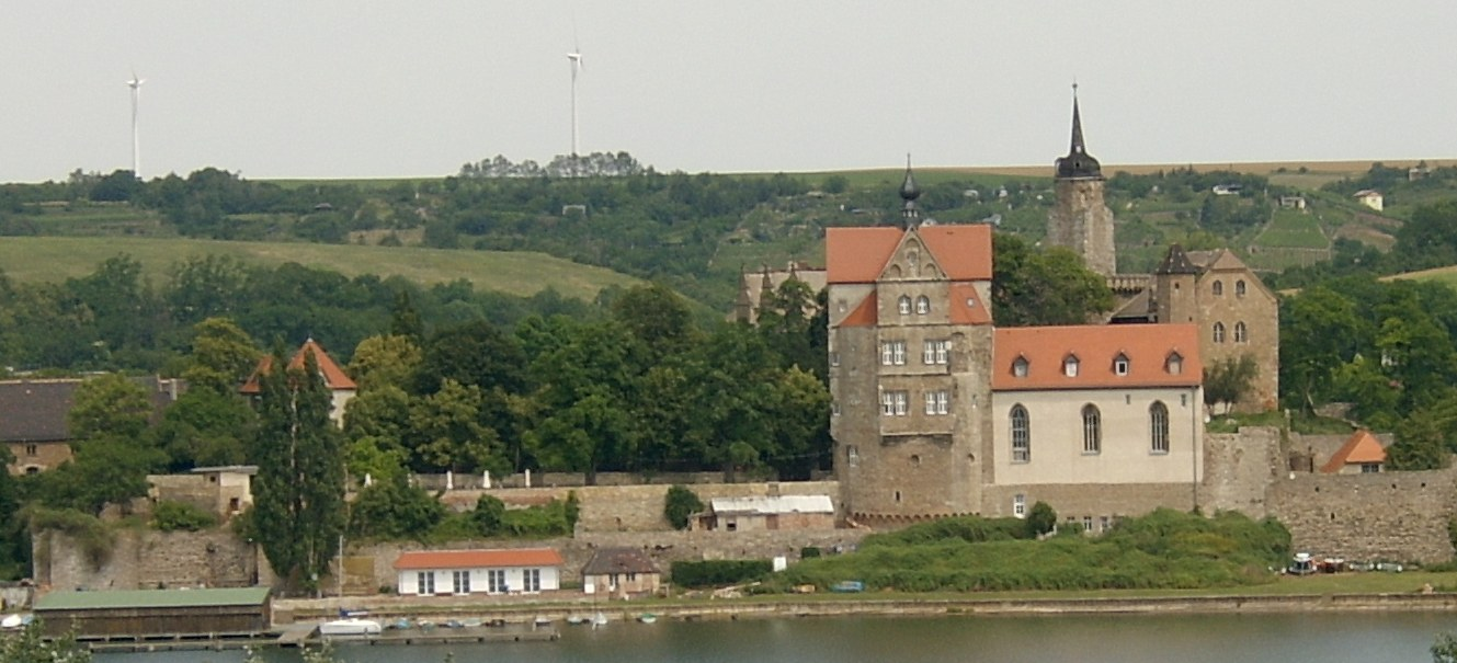 Schloss Seeburg in Seeburg (Mansfelder Land)